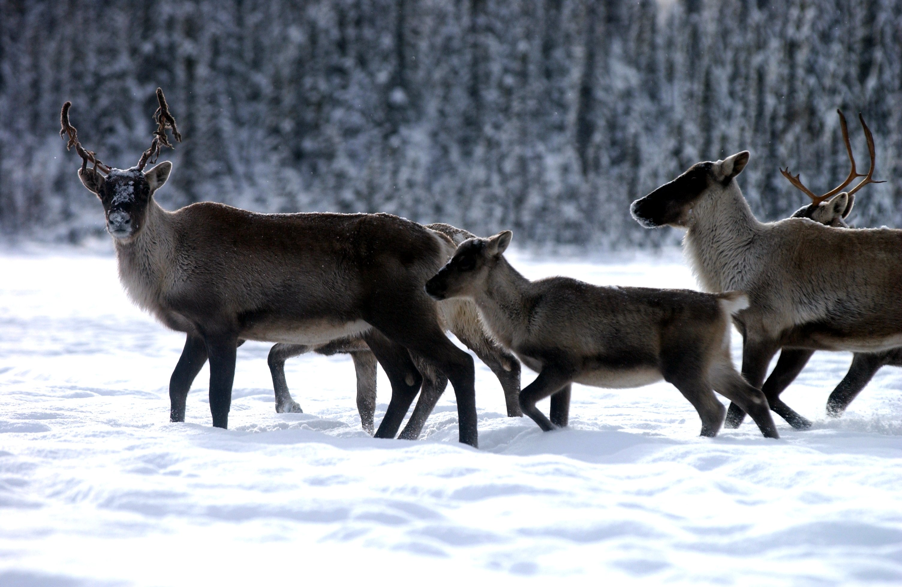 Toutes les tranches d'âge se regroupent pour la migration.